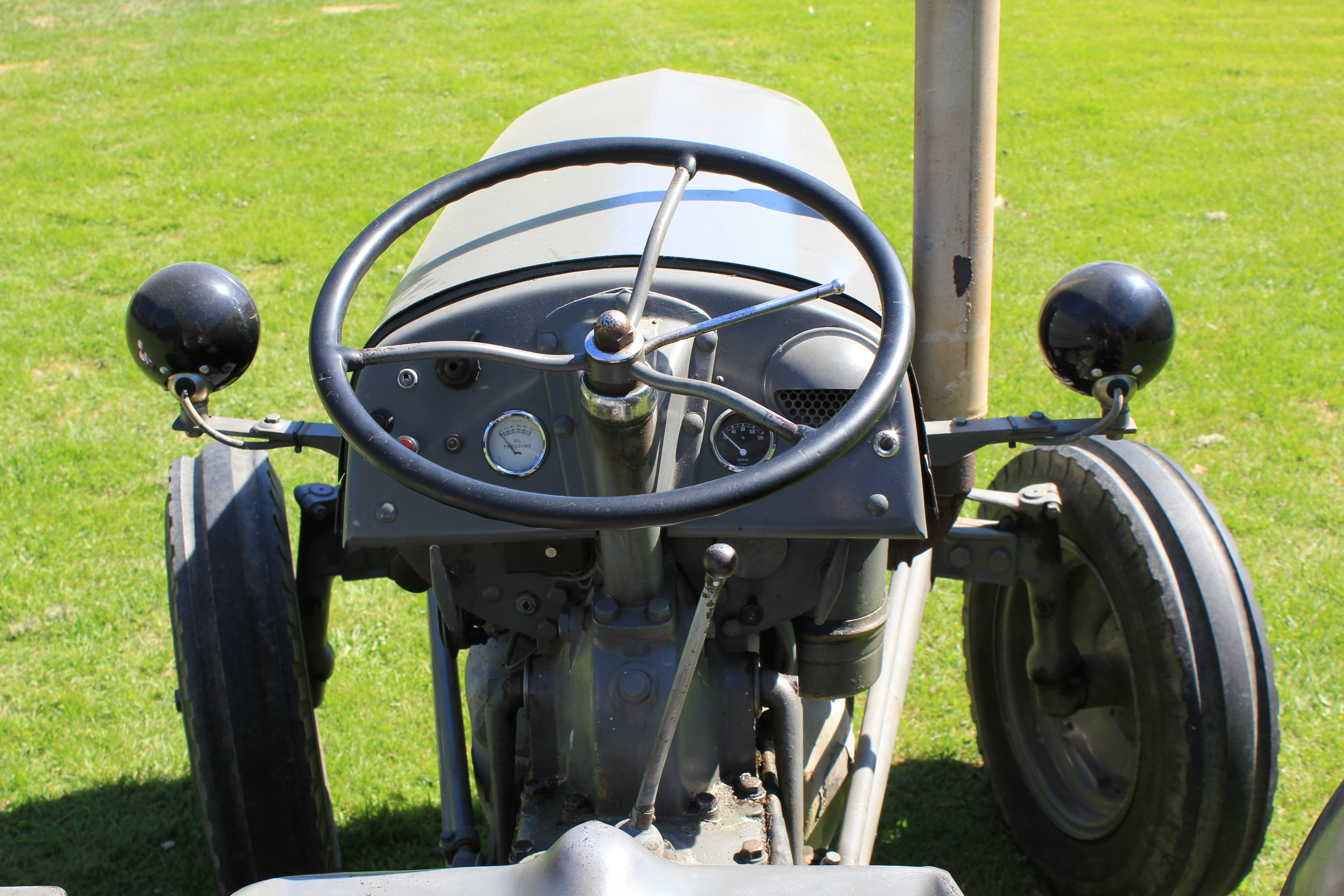 Gråtass.